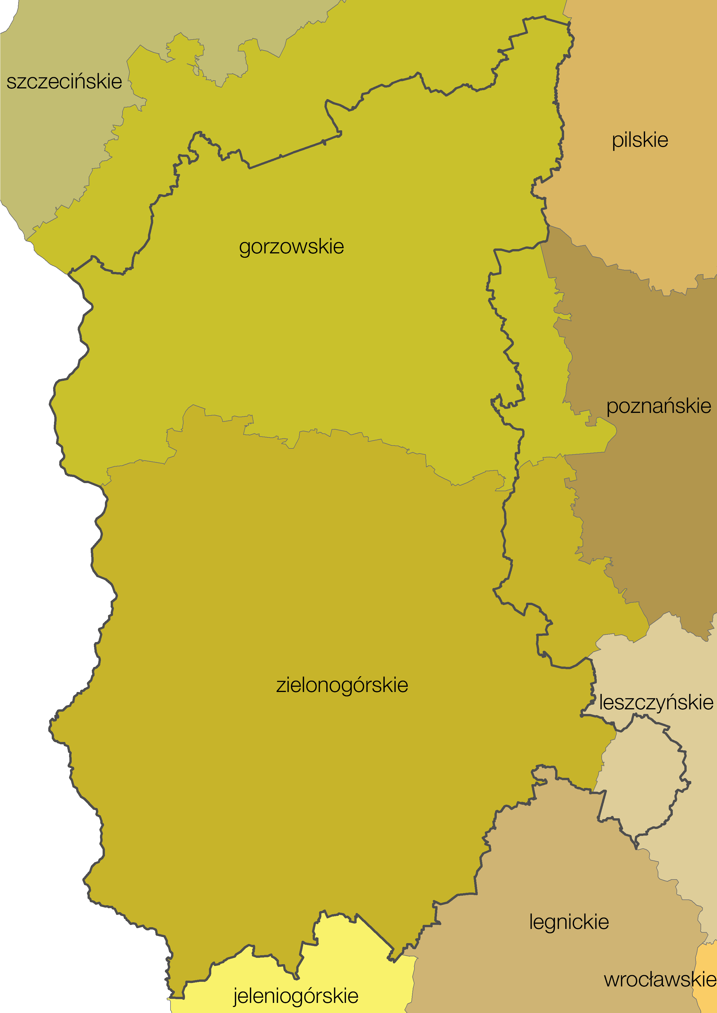 Województwo lubuskie (od 1999) jako powstałe z województw podziału administracyjnego Polski z lat 1975-1998